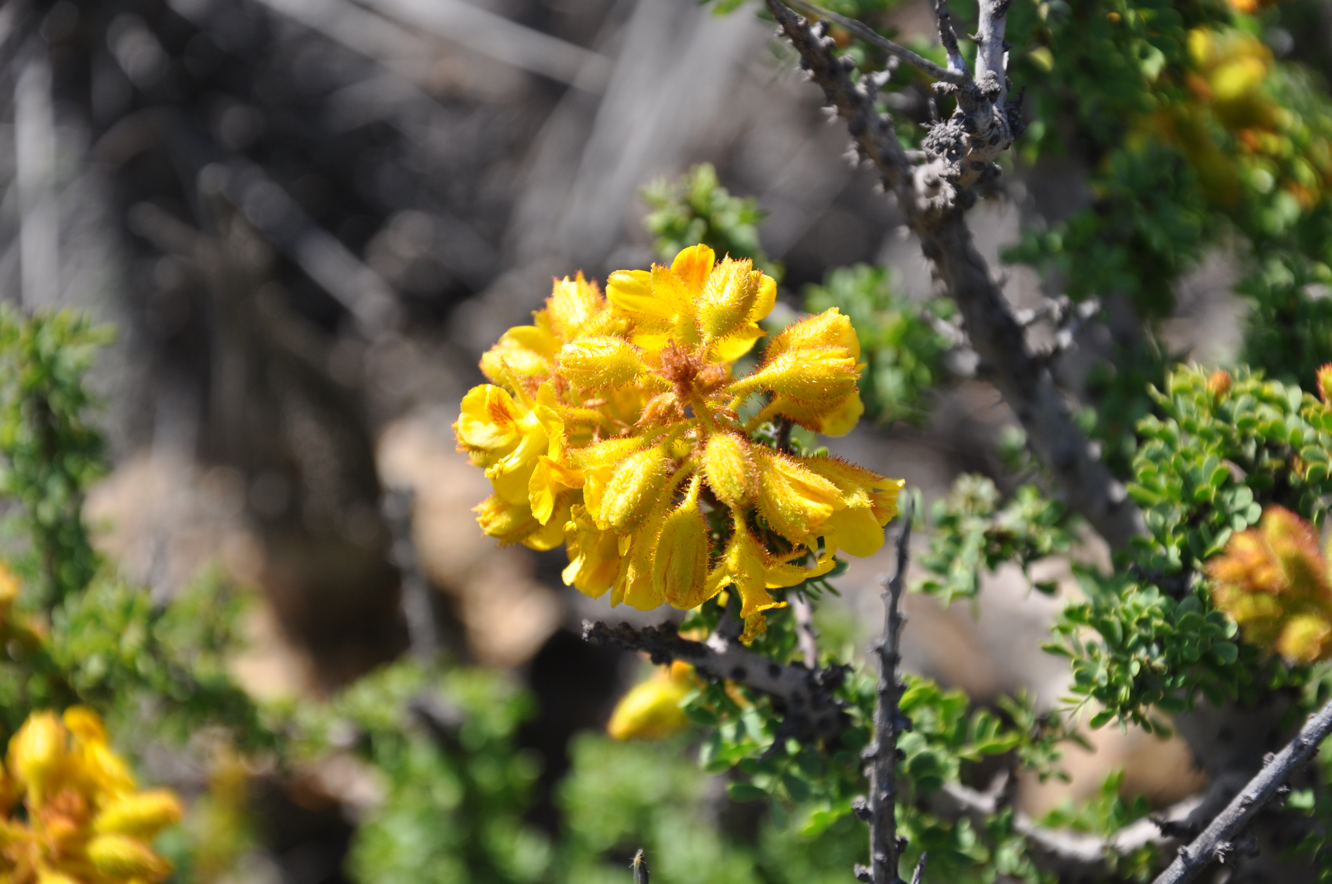 Balsamocarpon brevifolium Desierto florido 2011 sector Quebradita, comuna de Freirina